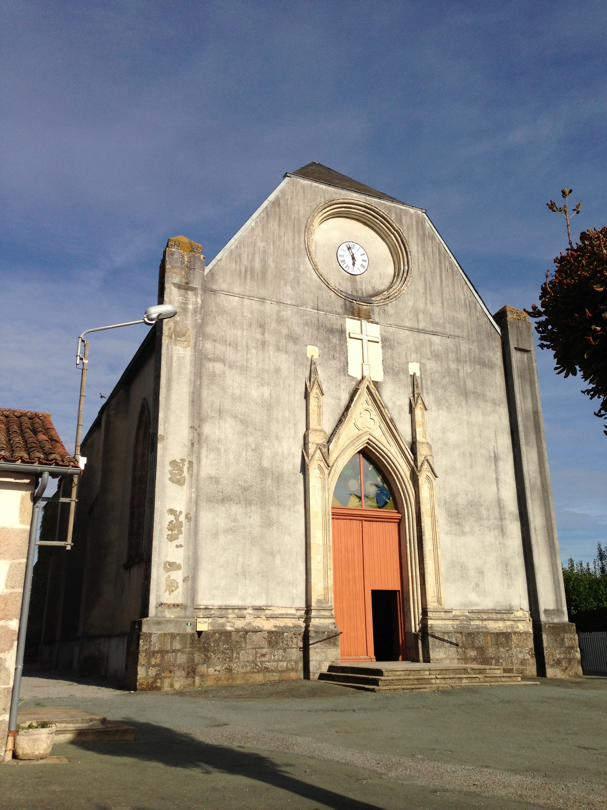 Façade de l'Eglise Saint Radegonde Vausseroux